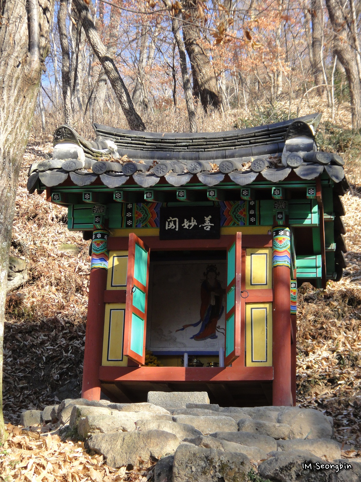 Seonmyogak, Buseoksa, Yeongju (영주 부석사 선묘각)